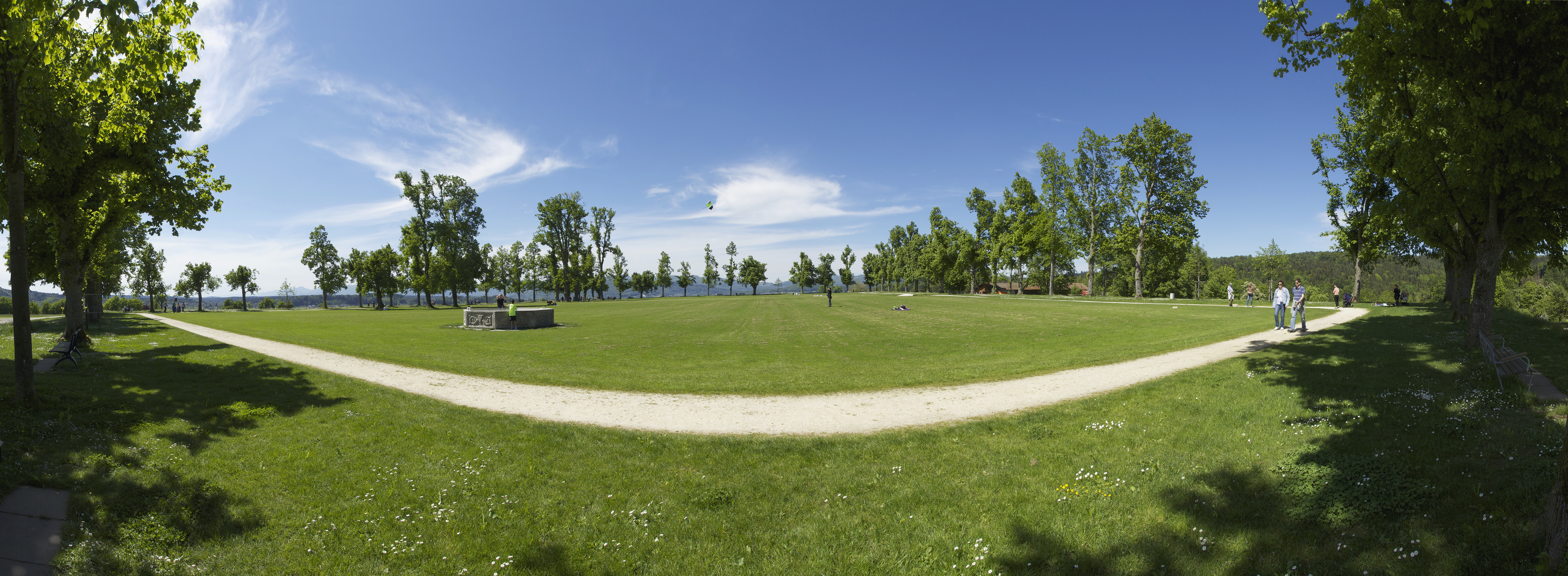 Der Heiternplatz in Zofingen; 180°-Panorama. Ein Kulturgut von nationaler Bedeutung im Kanton Aargau, ein sogenanntes A-Objekt.